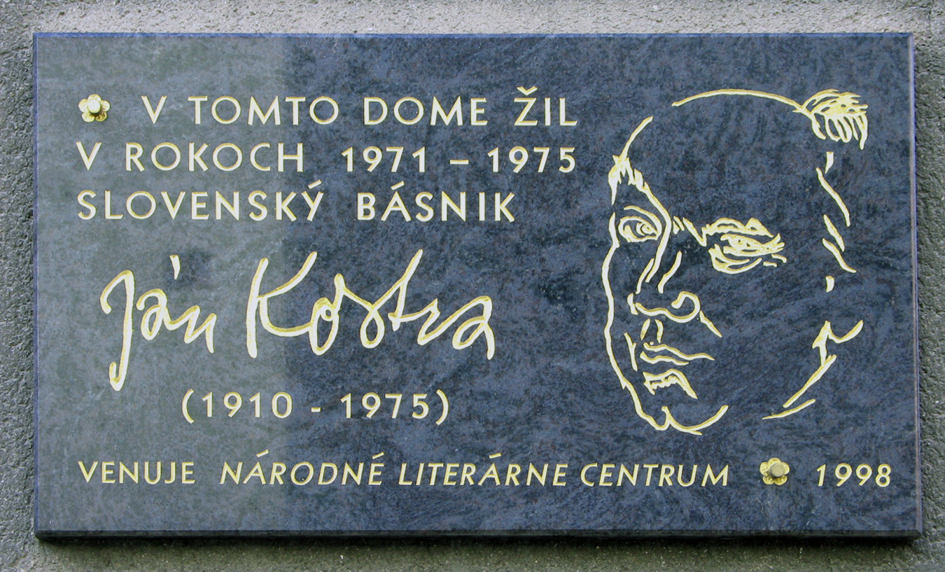 Pamätná tabuľa na poeta Jána Kostru